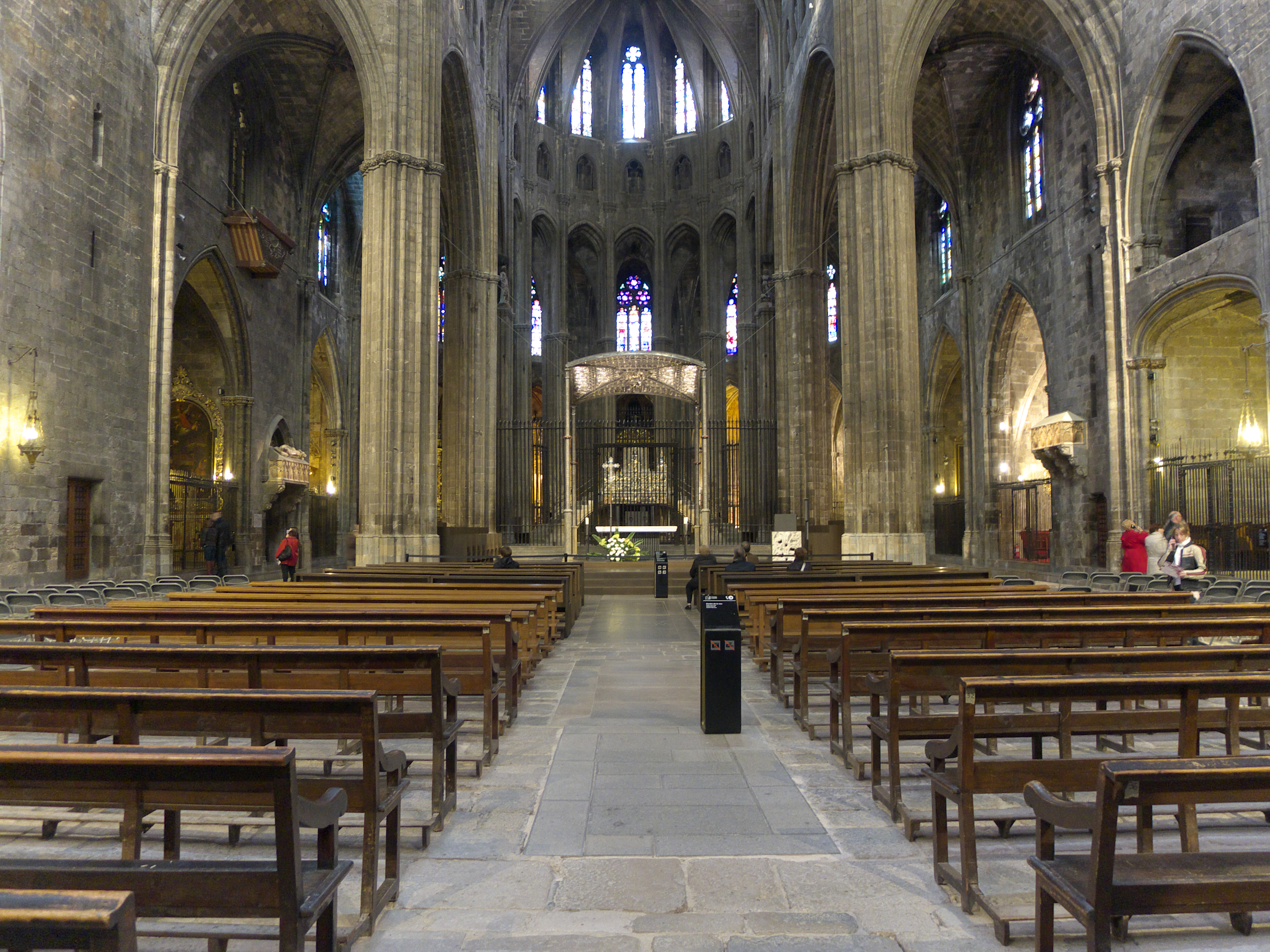 Terminada en 1347, se observa las primeras trazas gótica con planta de tres naves.